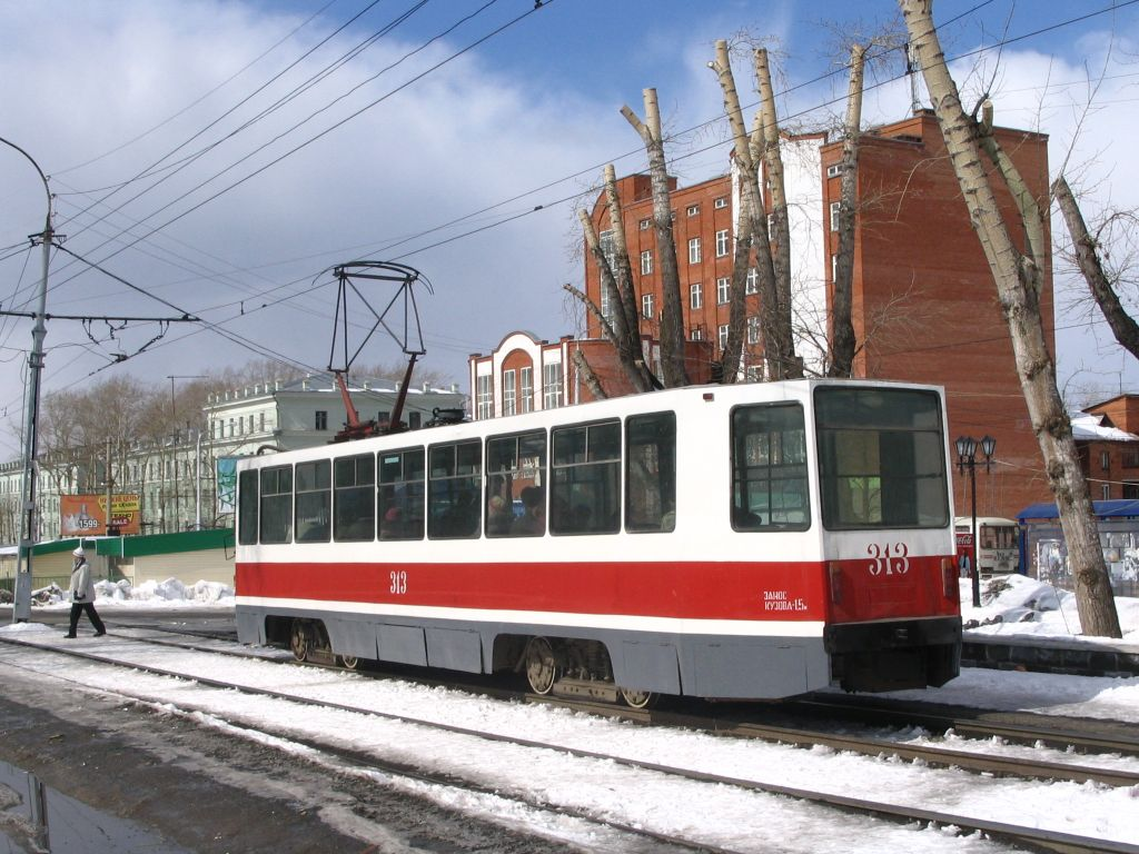 Modern tram in Tomsk, rear view